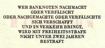 Warnhinweis auf einer 1000 DM-Banknote (Serie 3): Wer Banknoten nachmacht oder verfälscht, oder nachgemachte oder verfälschte sich verschafft und in Verkehr bringt, wird mit Freiheitsstrafe nicht unter zwei Jahren bestraft